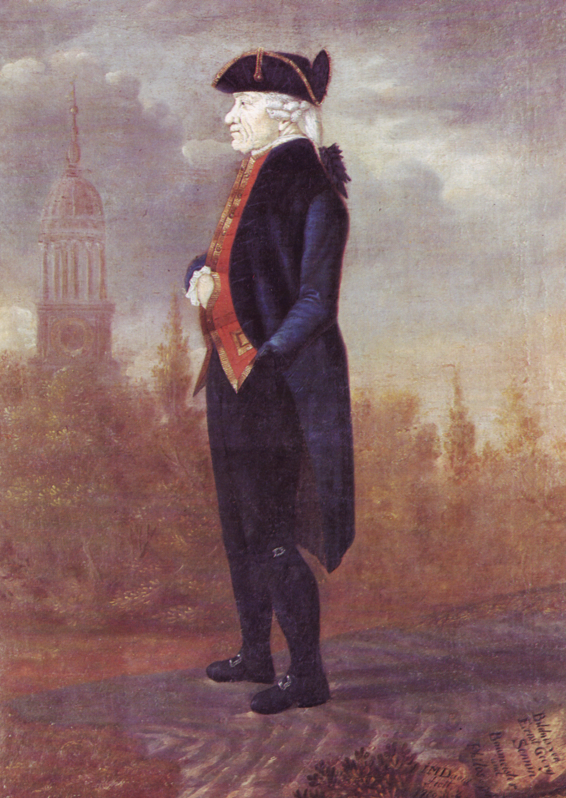 Posthumes Porträt des Architekten Ernst Georg Sonnin, von Johann Marcus David (1764-1815) im Jahre 1802 gemalt.